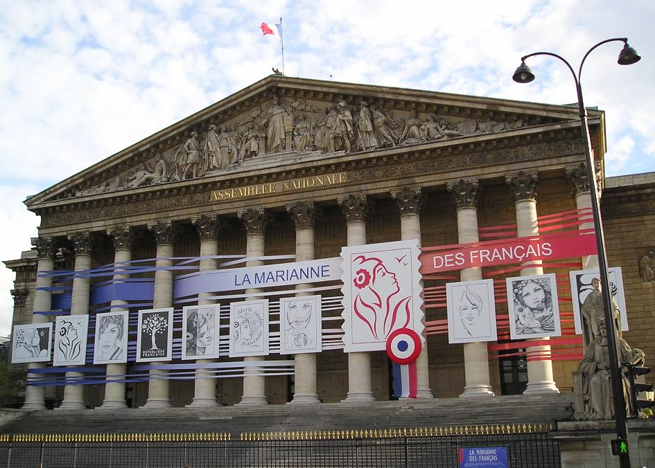 Description:Les dix projets de Marianne des Français sur la façade du palais Bourbon, paris, été 2004 Source: Photographie par Utilisateur:Sebjarod le 10 août 2004 Licence:Domaine public